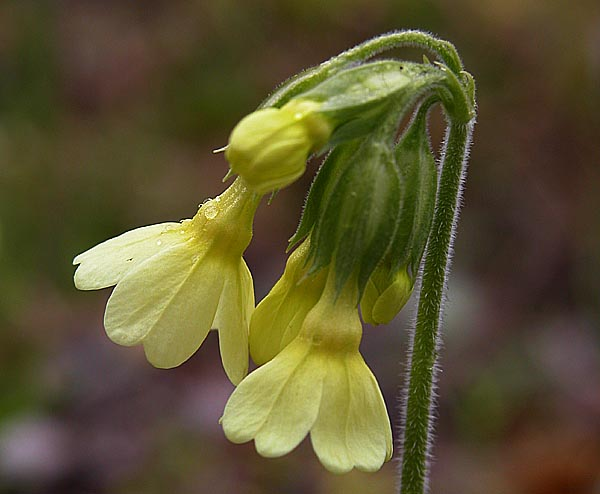 Wald-Schlüsselblume bzw. Hohe Schlüsselblume (primula elatior), aufgenommen im Schwalbachswald in Buseck